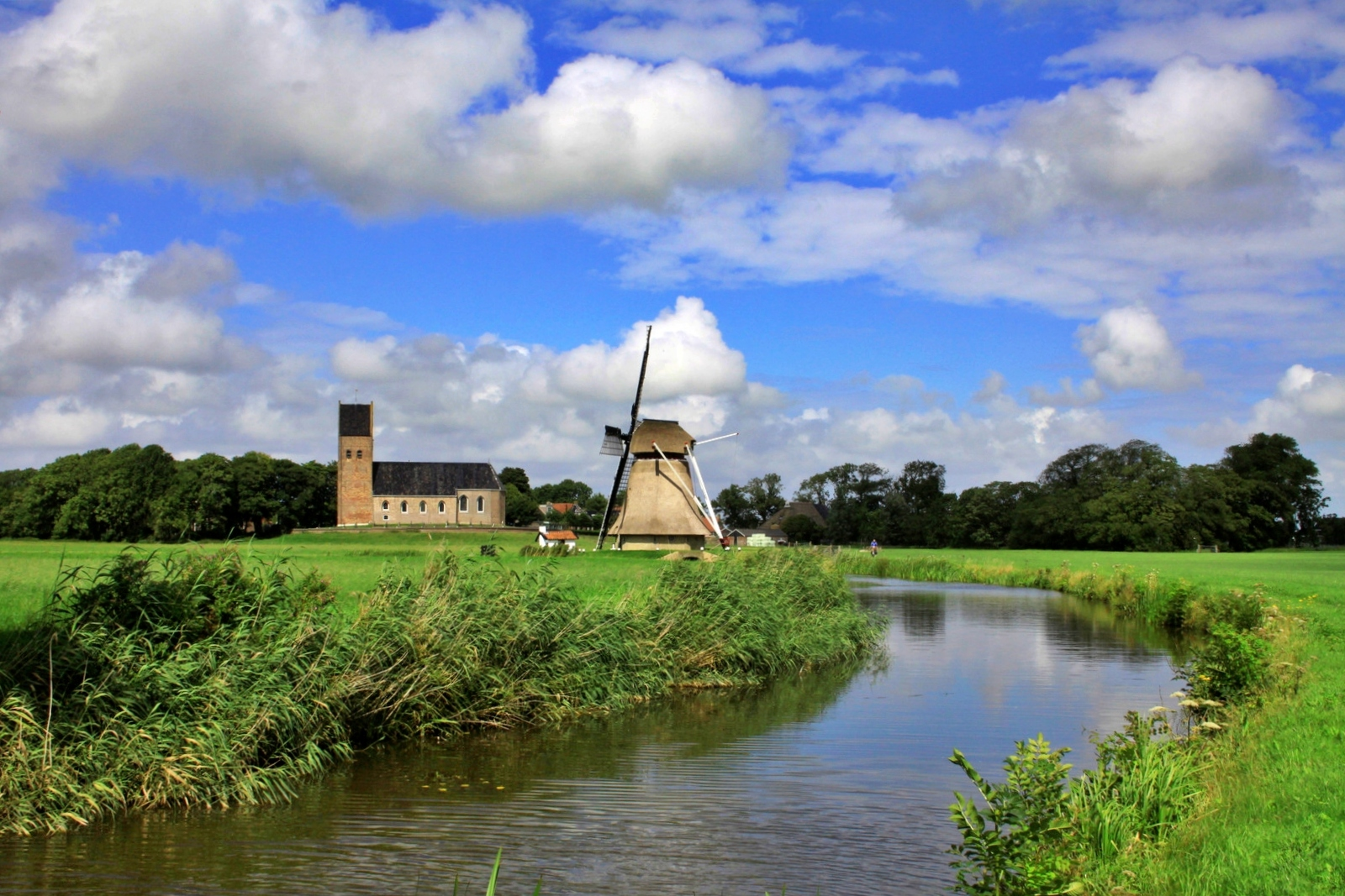 Prachtig gelegen Wanswerd in het Friese landschap.